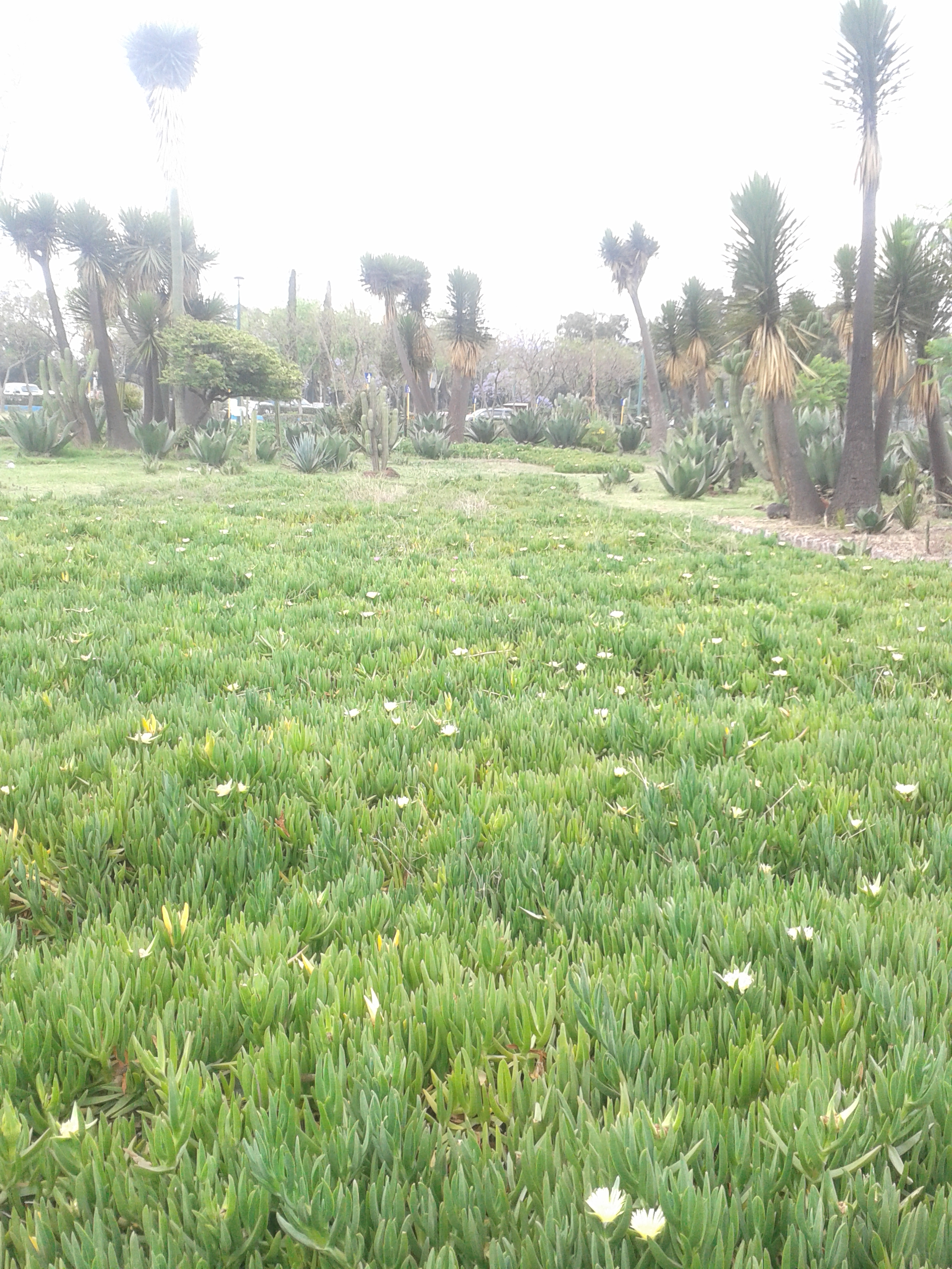 esta zona esta dentro de la alameda oriente y en ella se encuentran varias especies de plantas